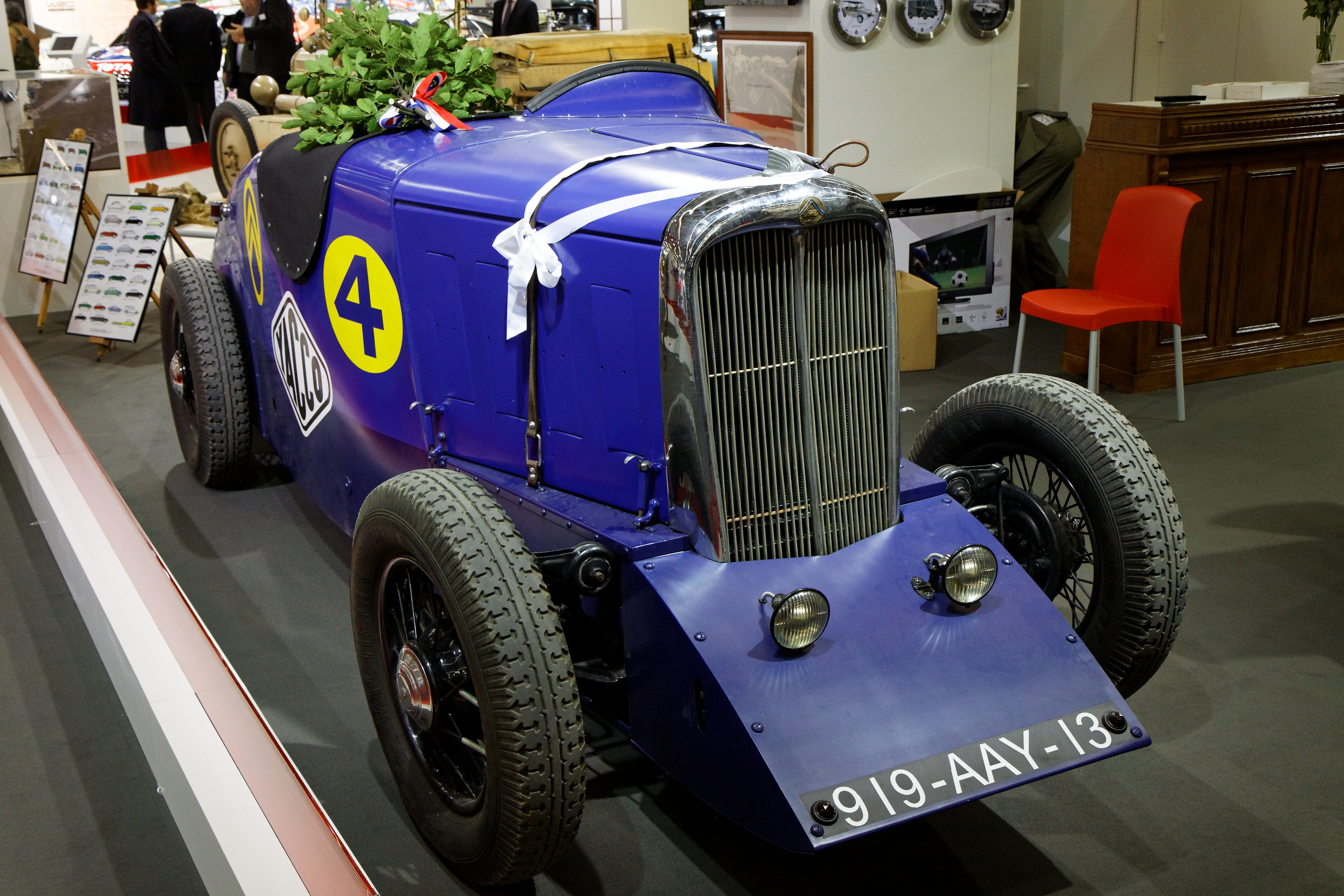 Photographie prise lors du salon rétromobile 2011 à Paris, porte de Versailles.